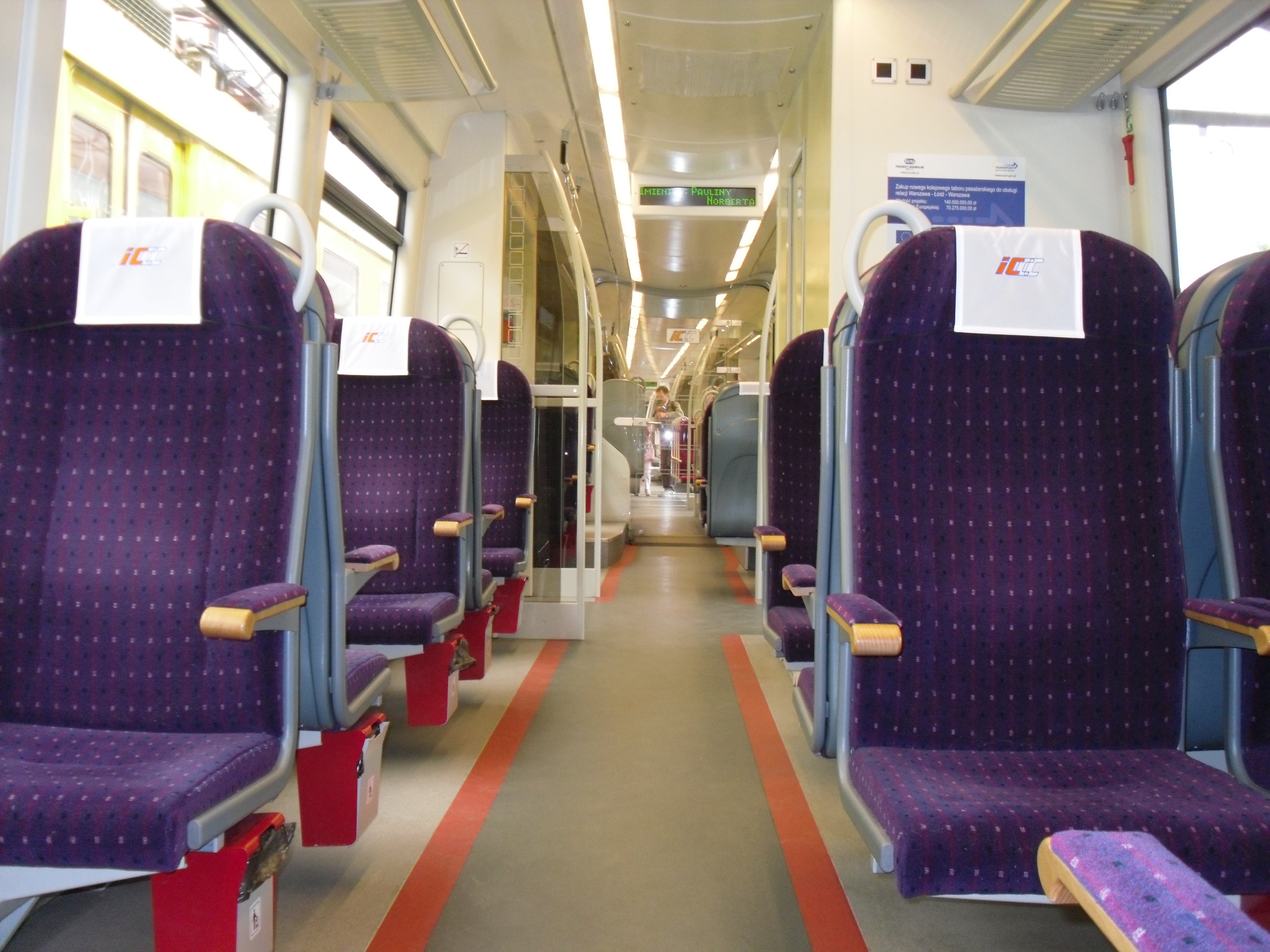 Wnętrze pierwszej klasy jednostki elektrycznej ED74.